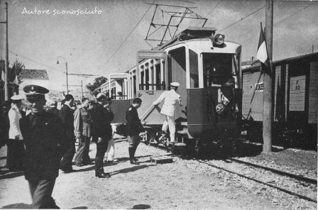 Tram di Offida, seconda inaugurazione della linea